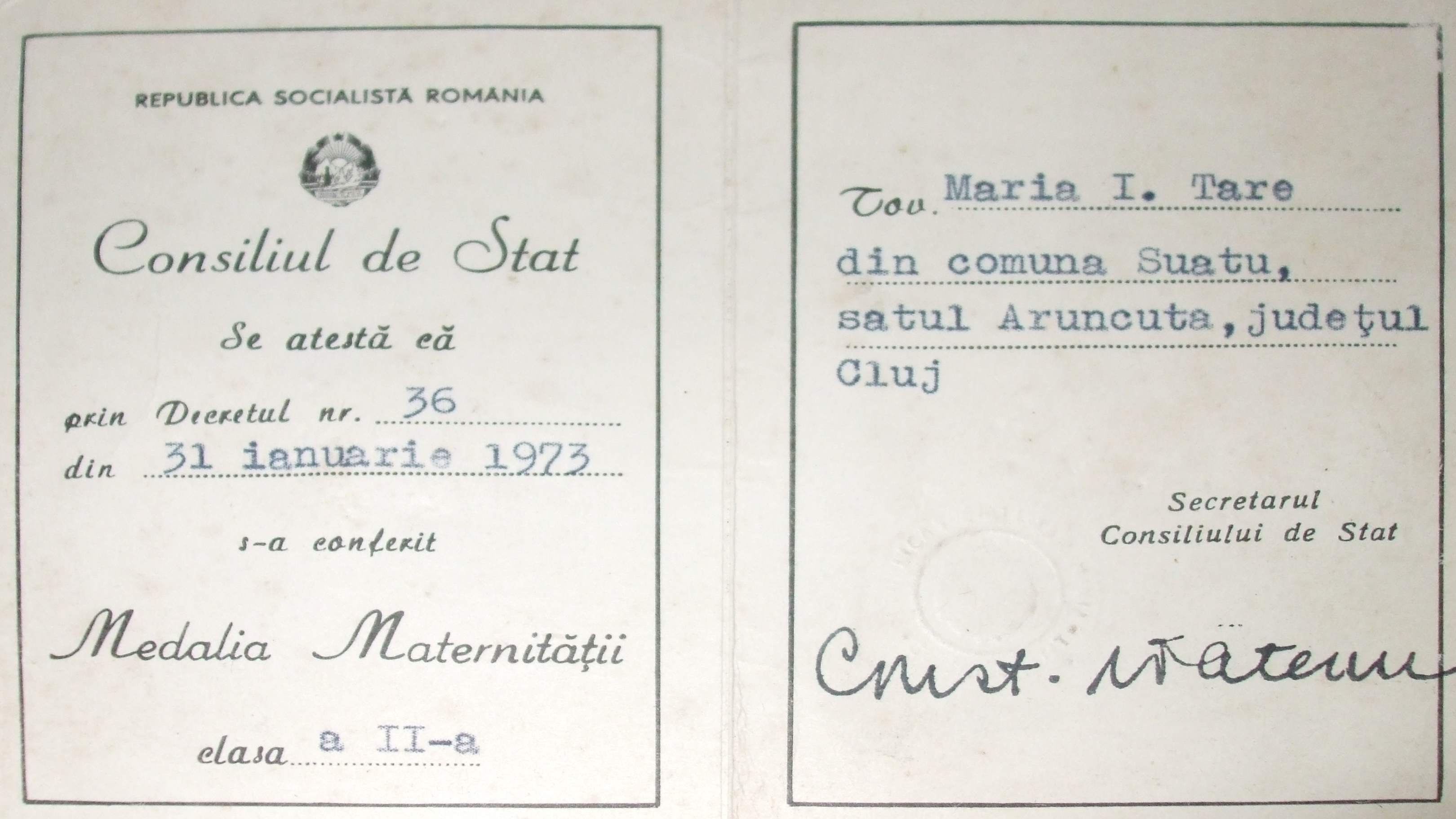 Medalia maternitatii acordata de comunisti femeilor de la sate cu multi copii , prin Decretul 36/1973 - un model de demagogie si batjocura la adresa femeilor .